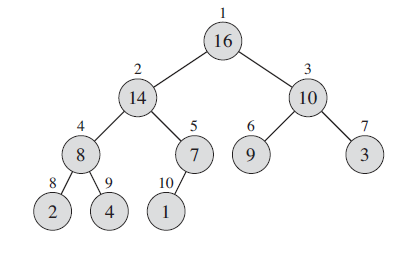 عدد های بالای هرگره ، اندیس آن در آرایه مرتب شده است .